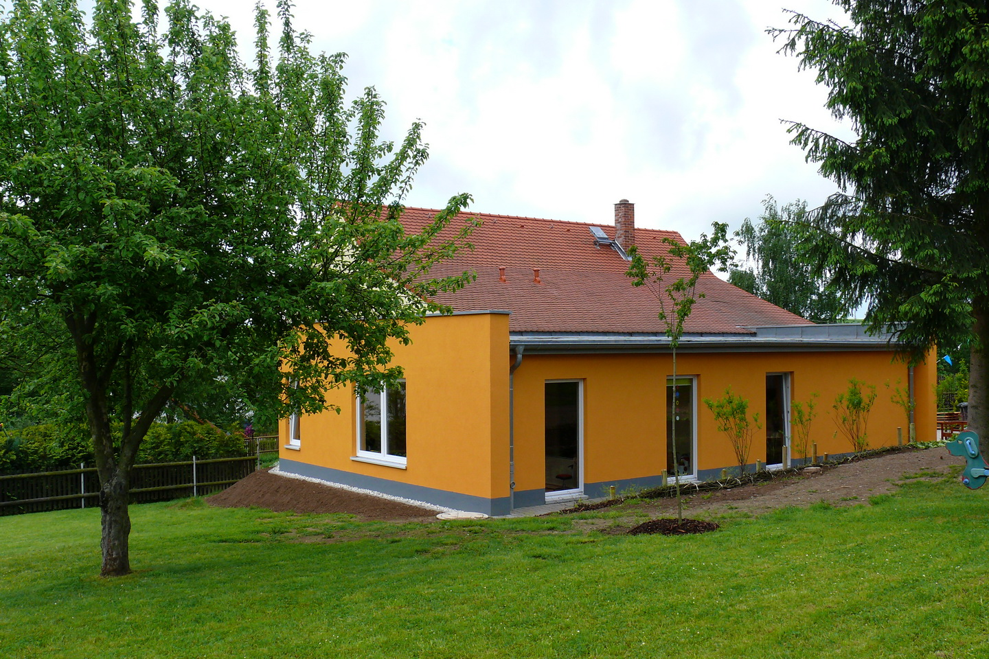 KiTa Paitzdorf